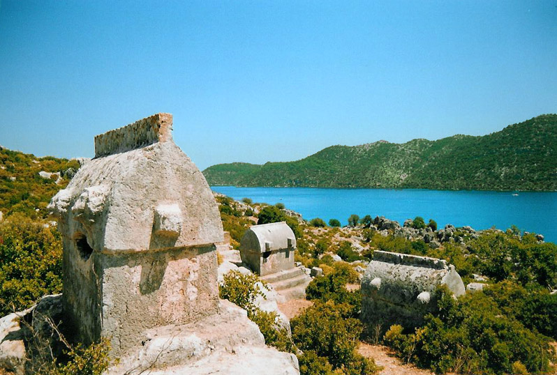 Kalekoy Island - Turkey, 2002